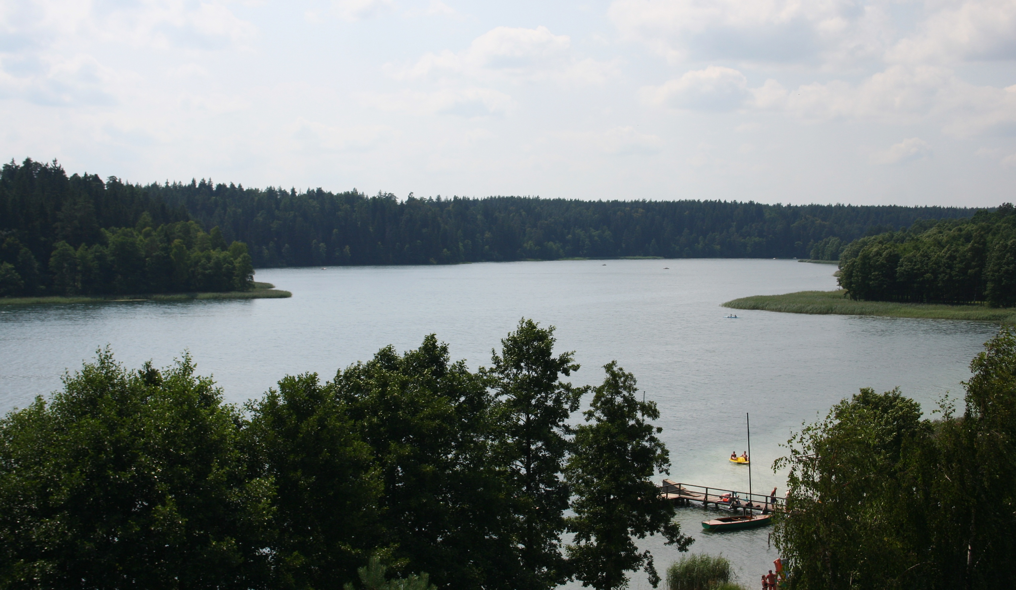 Zatoka Wigierki, widok z wieży w miejscowości Gawrych Ruda